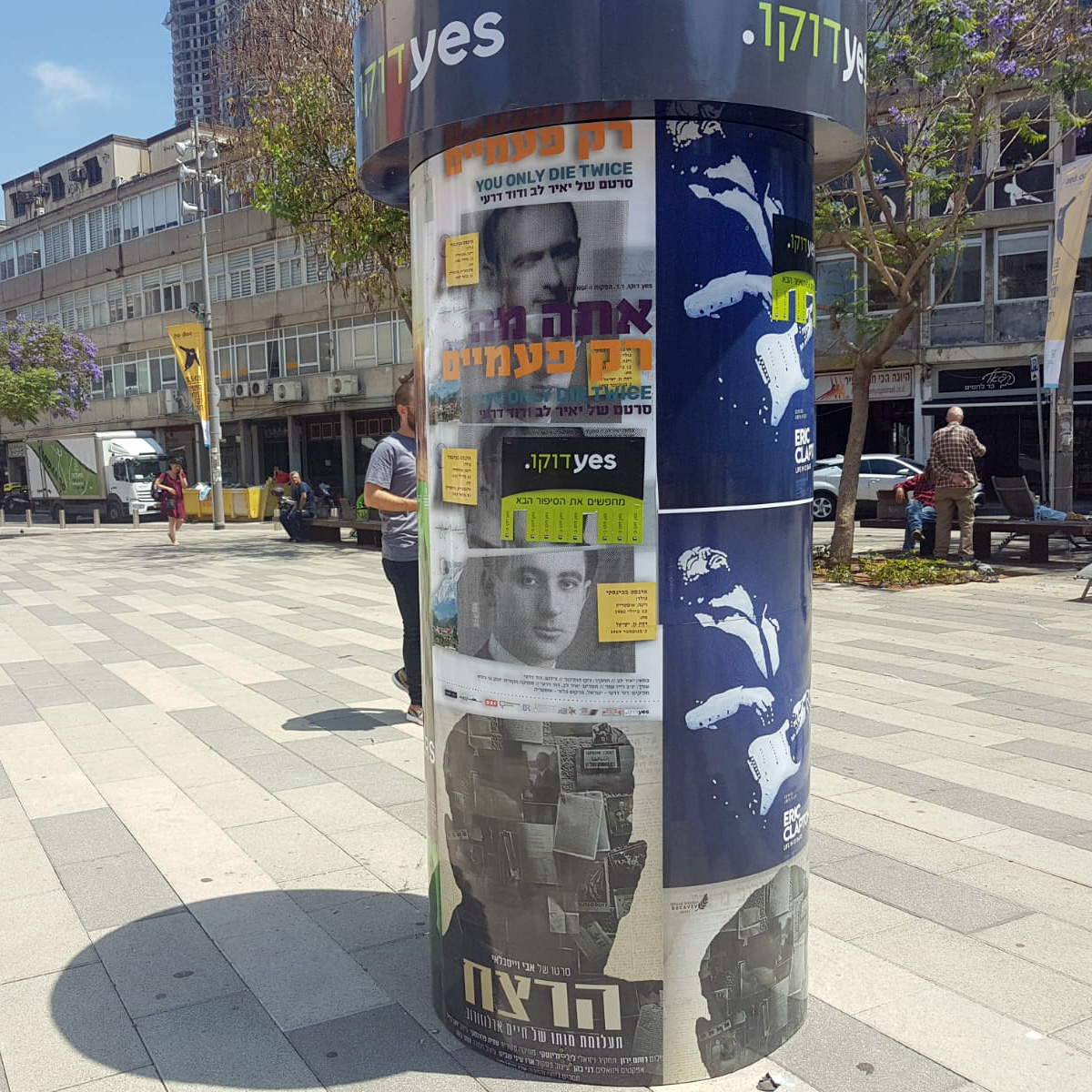 Litfaßsäule in den Straßen von Tel Aviv während des docaviv Festivals 2018